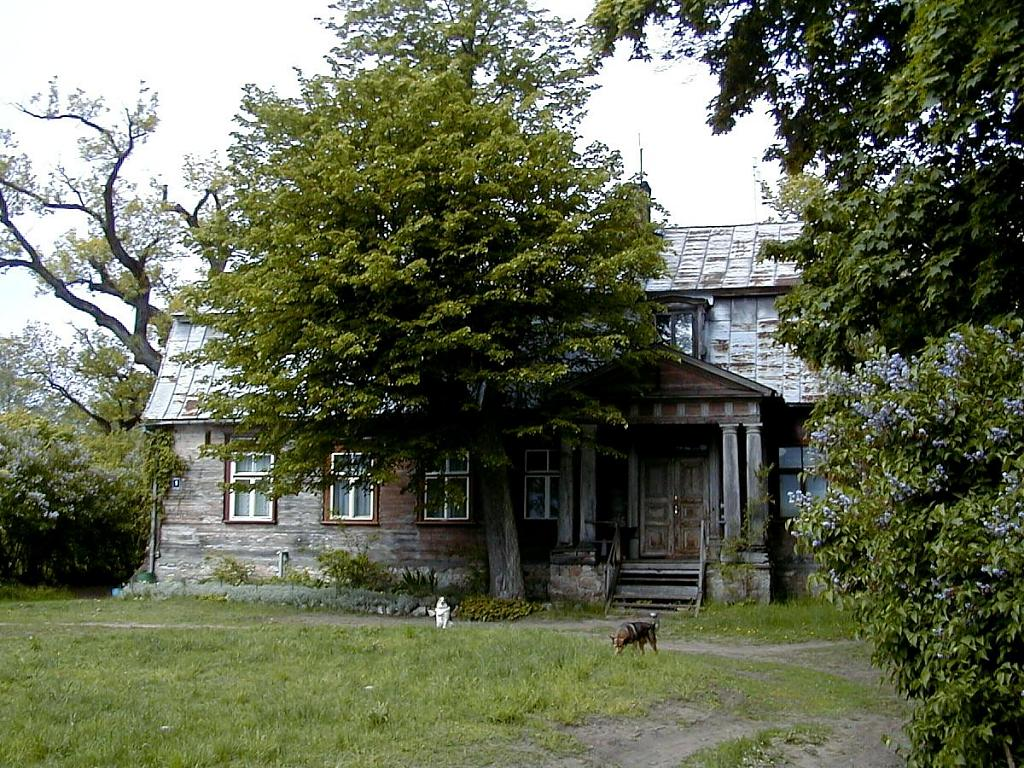 Kleistu muiža Rīgā 2004-05-30